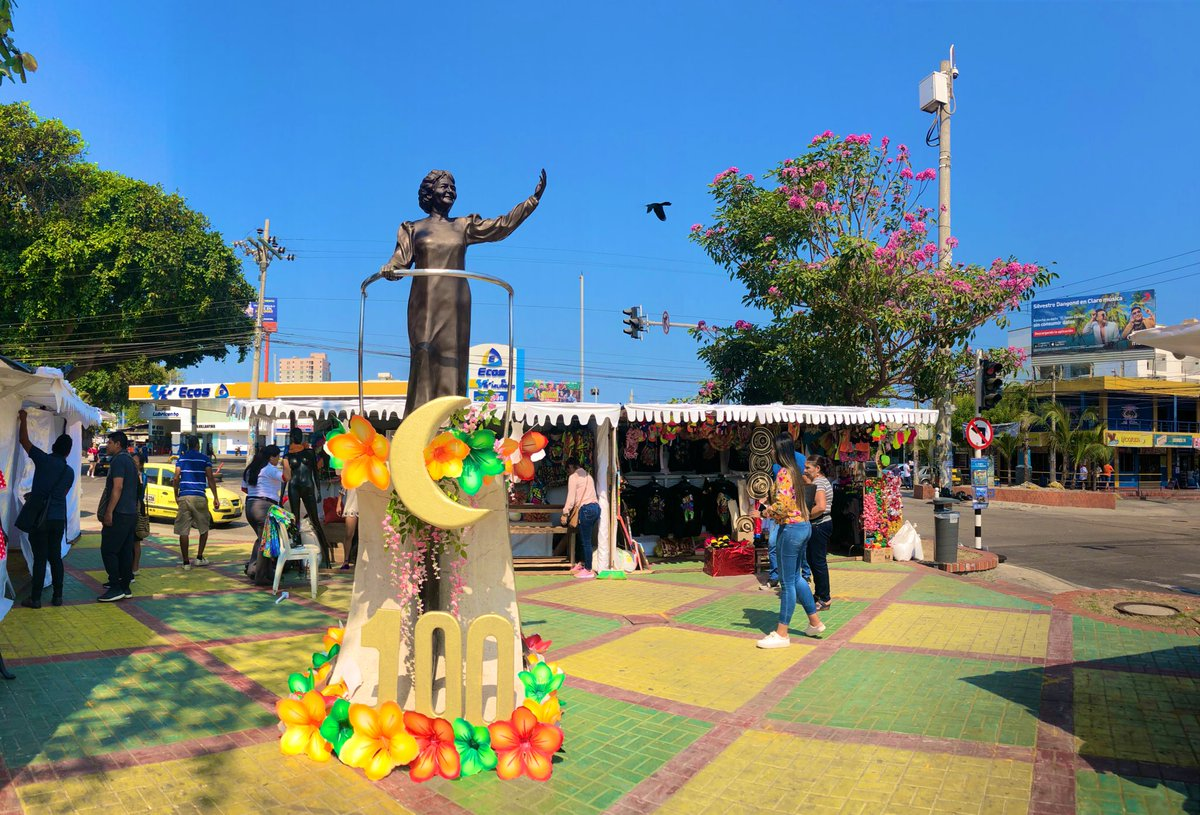 La novia de Barranquilla